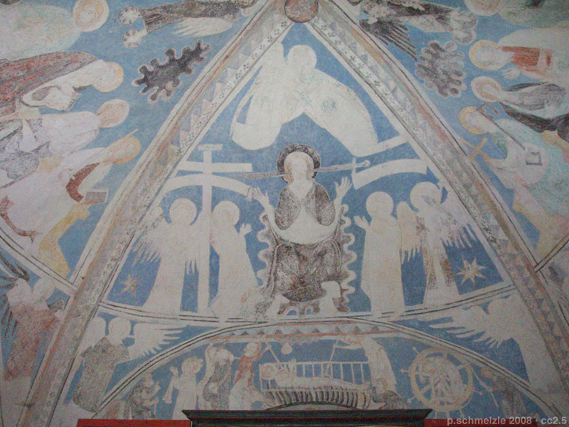 Darstellung des Weltenrichters, von dessen Antlitz zwei Schwerter ausgehen, im Chorgewölbe der Gangolfskapelle in Neudenau. Darunter: Märtyrerdarstellungen, u.a. Hl. Laurentius auf dem Rost und Hl. Georg auf dem Rad